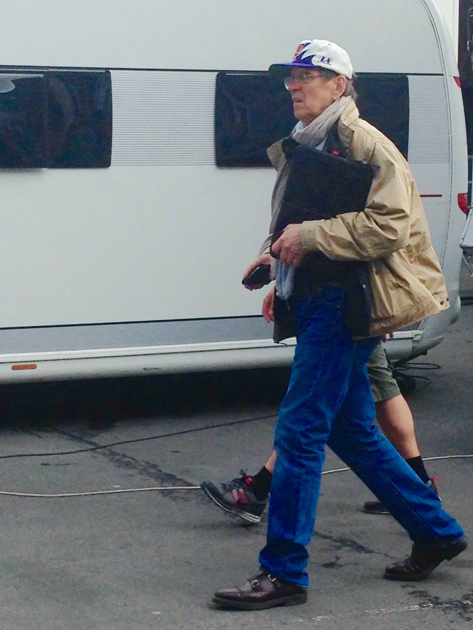 Jean-Marie Poiré lors du tournage de son film Les Visiteurs 3 : La Terreur, en juin 2015, à Namur.